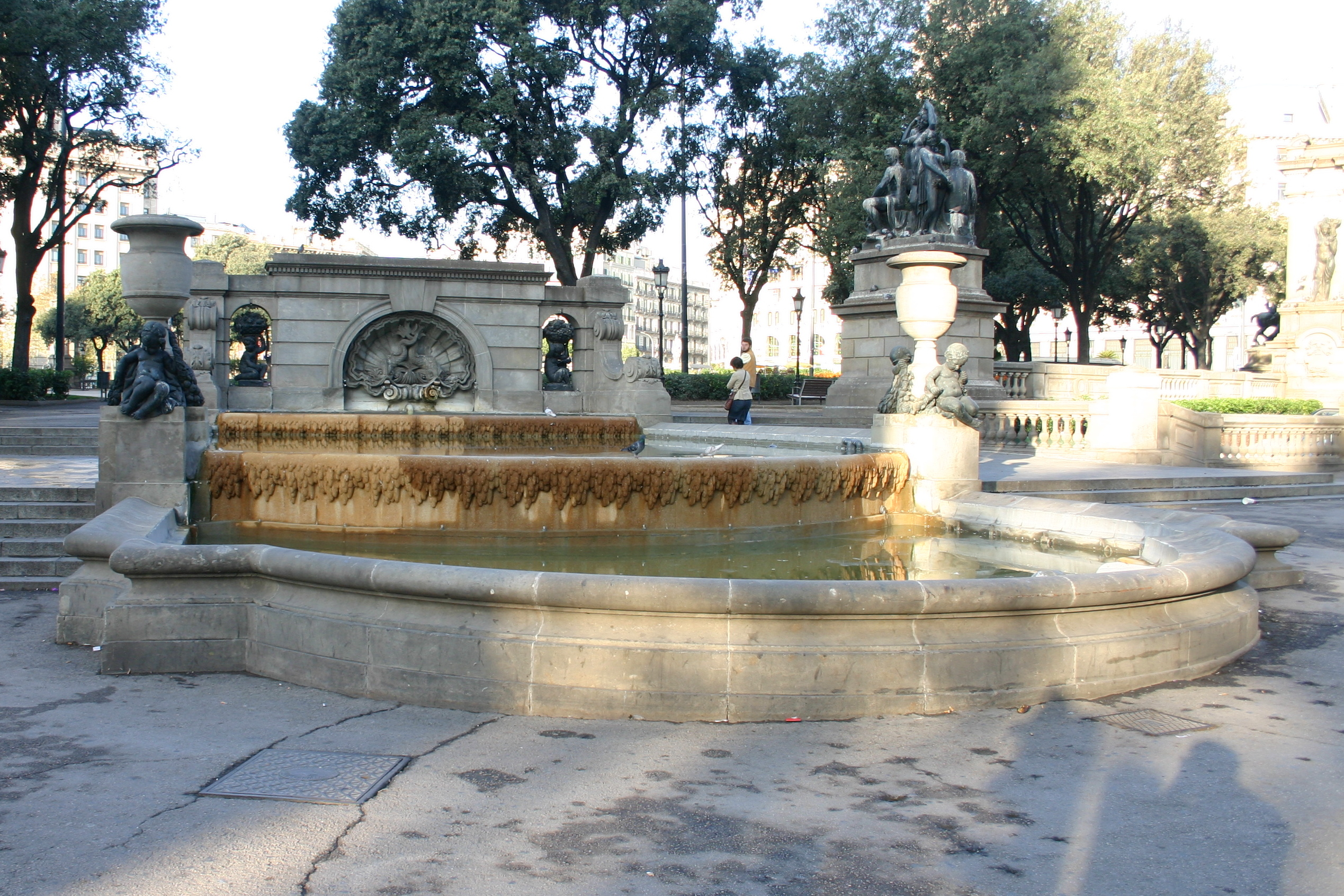 2801.Font dels sis Putti. Plaza Catalunya, Barcelona (Spain)